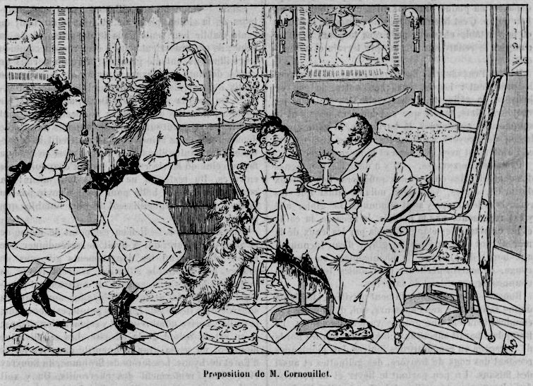 Première apparition de la famille Cornouillet (qui va devenir 7 mois plus tard la famille Fenouillard) dans Le Journal de la jeunesse n° 841, du 12 janvier 1889. Auteur et dessinateur : Christophe.